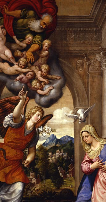 Pomponio Amalteo - Annunciazione Duomo di Cividale del Friuli olio su tela